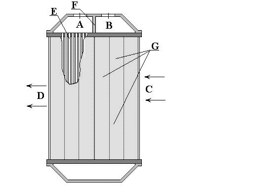 Rashladnik zraka LS.